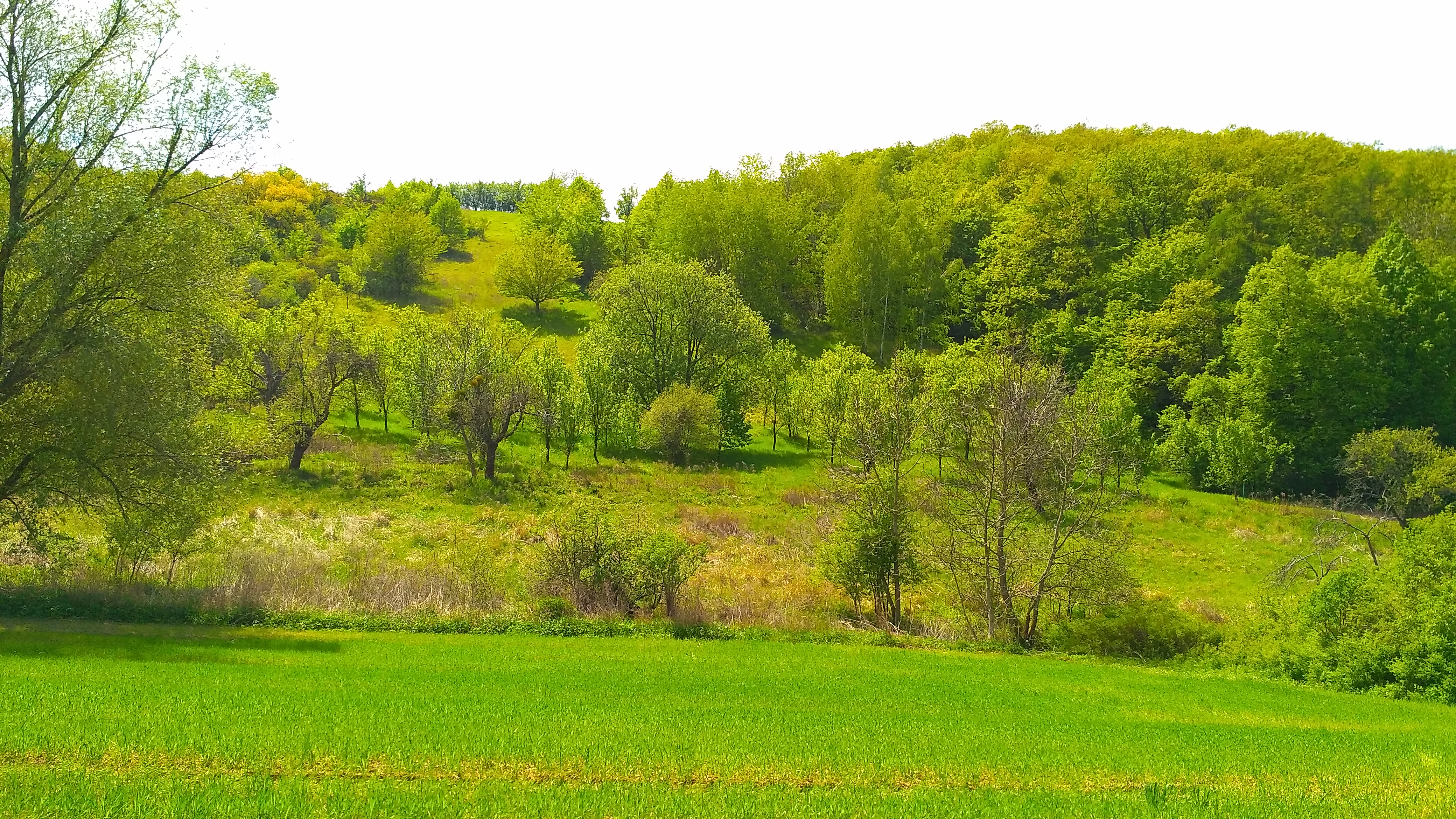 PP Ochozy